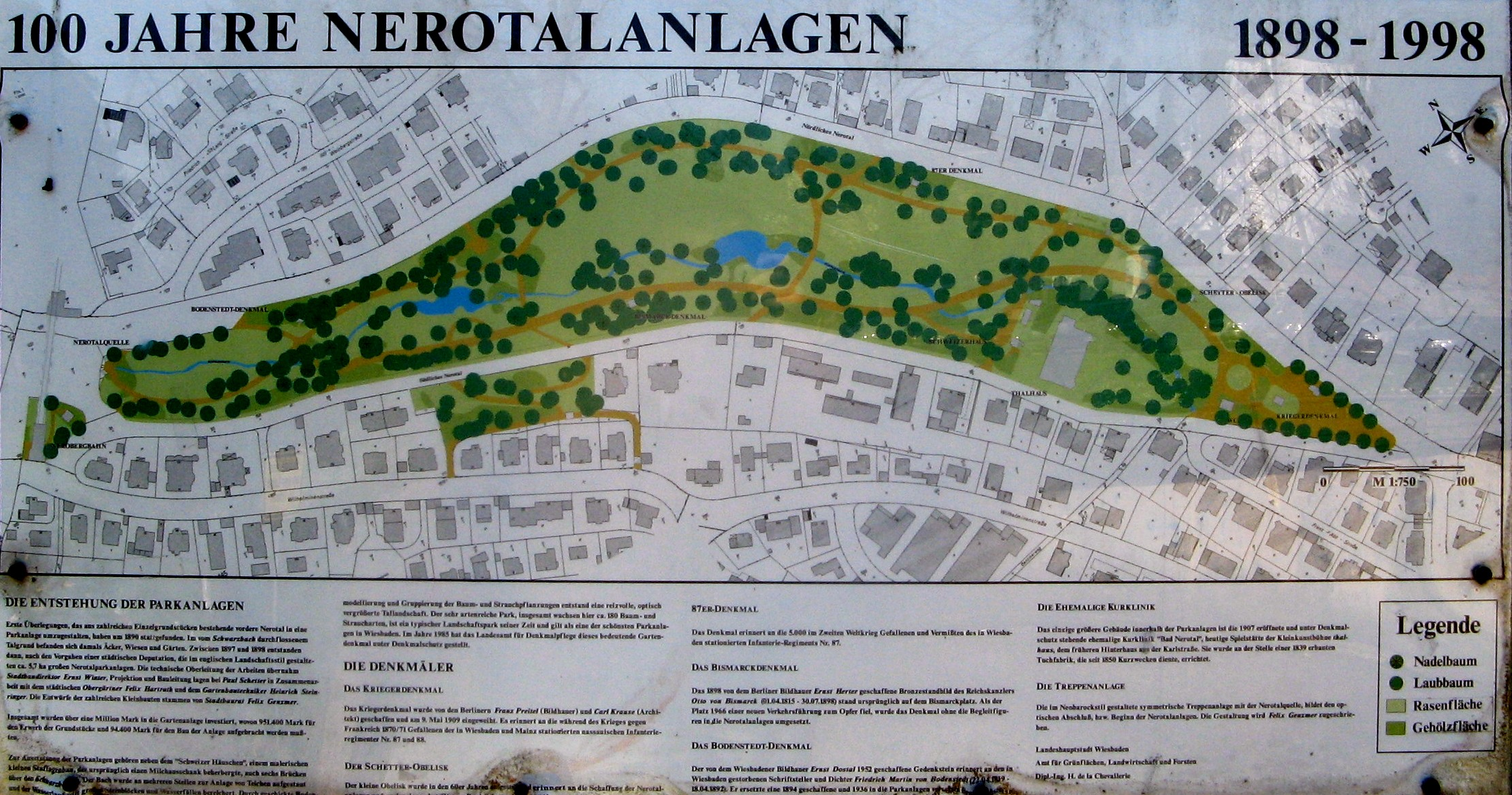 Nerotalanlage Wiesbaden